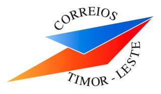 Logo der Correios de Timor-Leste